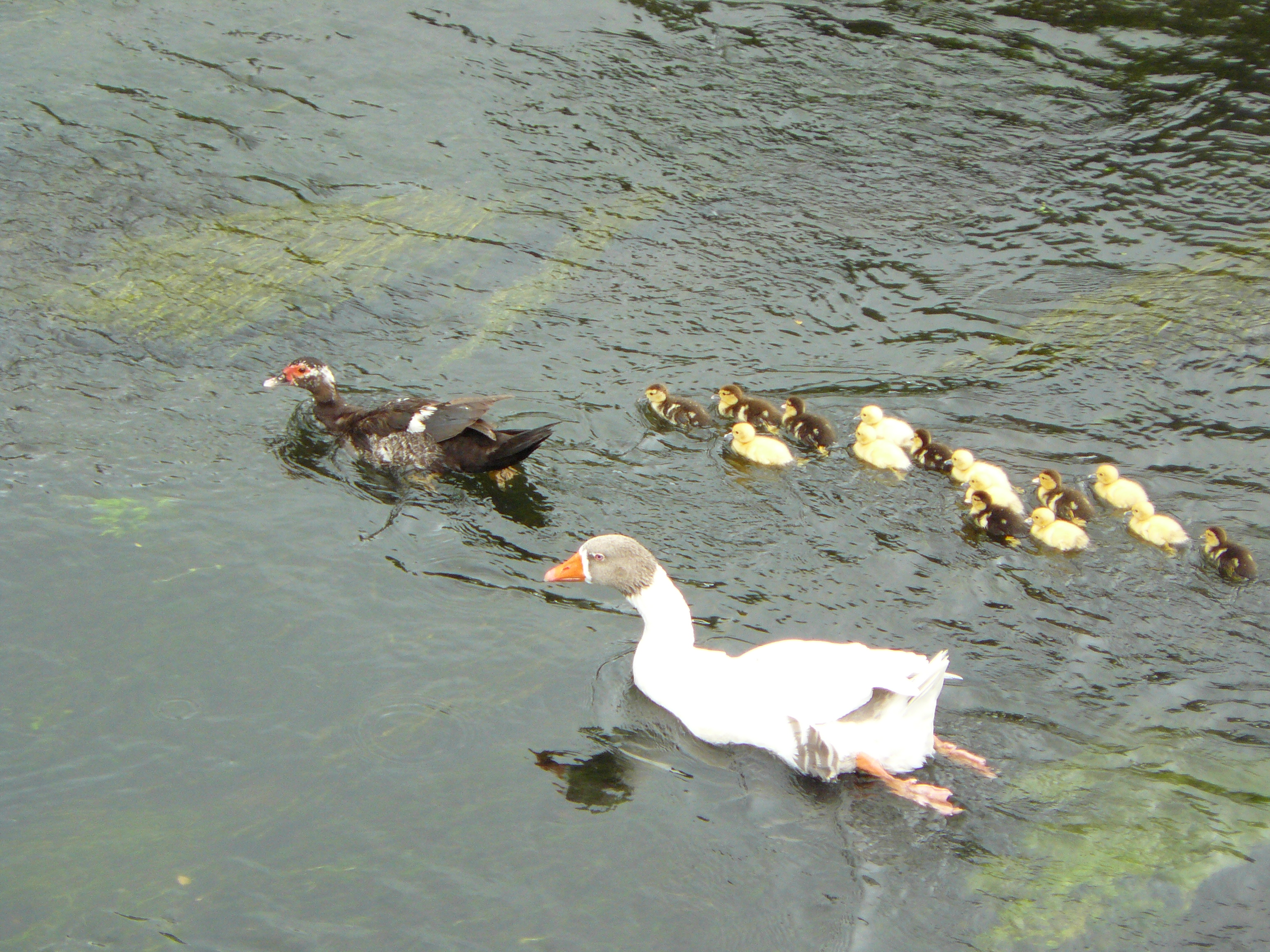 Familia de parrulos no río Sar ao seu paso por Padrón